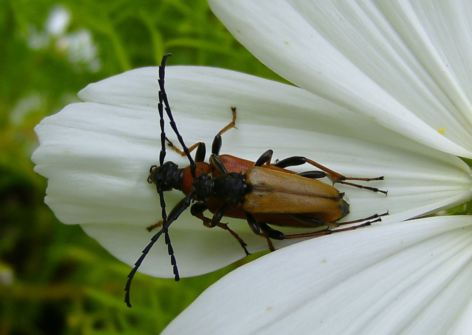 Rothalsbock, Kopula, 22.7.2016, Frankfurt am Main